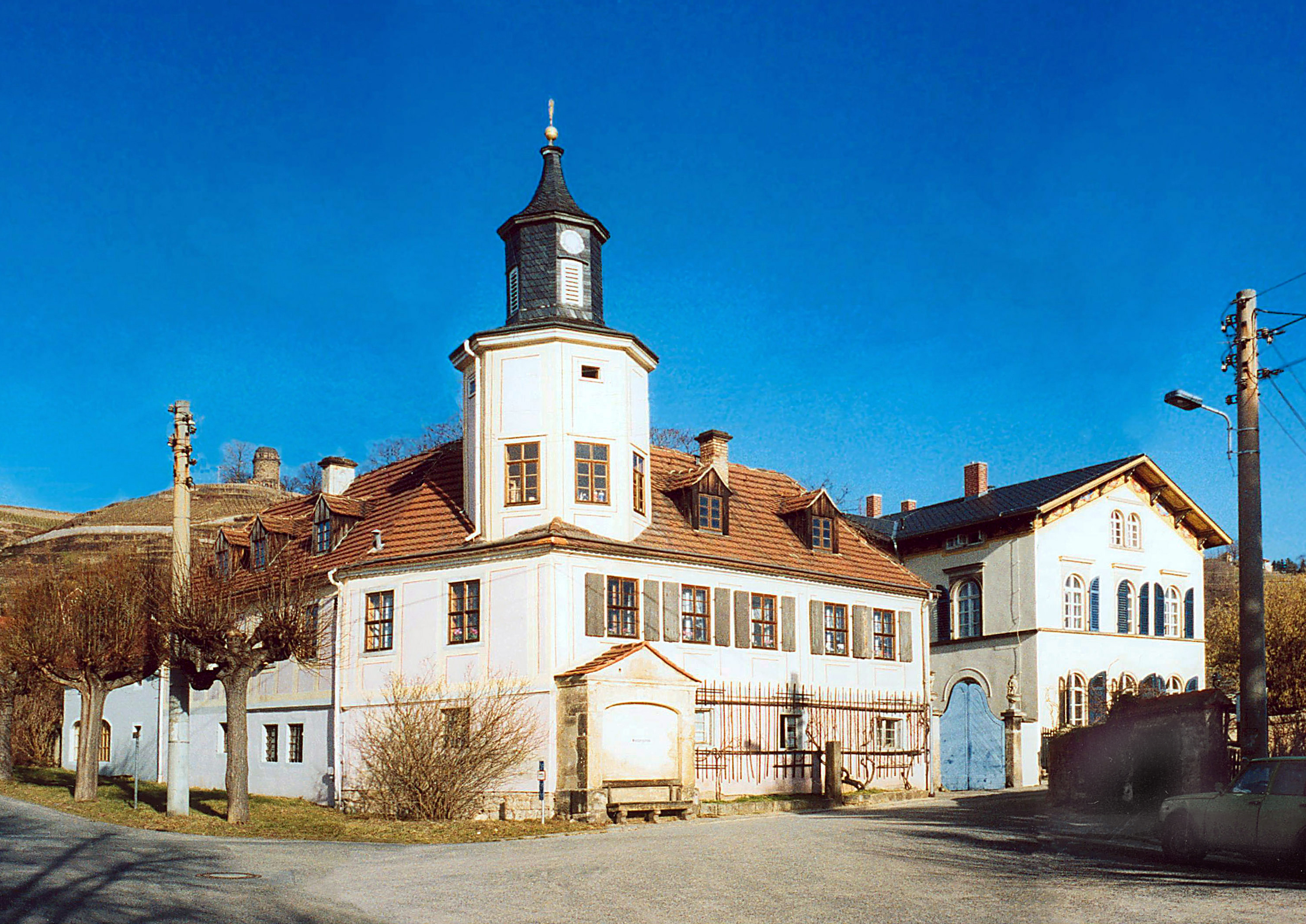 02.02.2002 01445 Radebeul: Weinbergstraße 10, Meinholds Weinberg mit Turmhaus, 16. Jh. [F20020129A]20020202200MAR.JPG(c)Blobelt